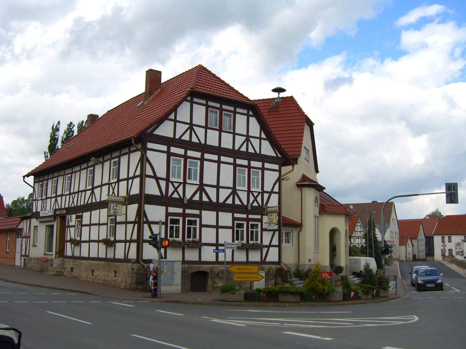 Kreuzung, Gemeindeverwaltung, Gemeindeschänke, Gemeindesaal in Gernrode